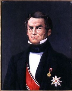 Hans Jørgen Christian Aall (født 1806, død 1894), norsk jurist, embetsmann og politiker.